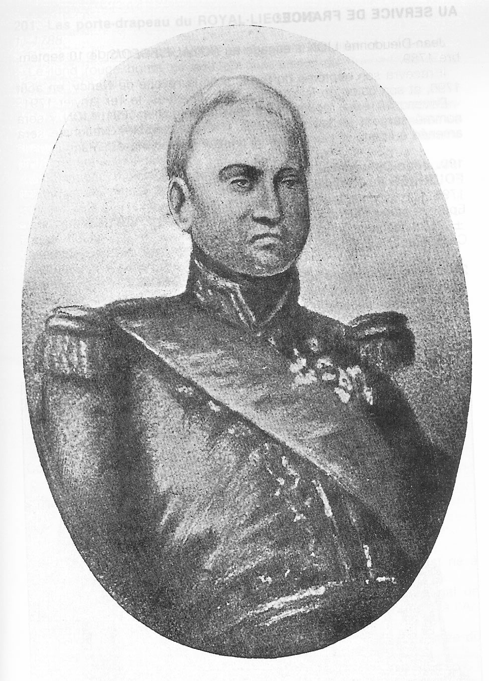 En grand uniforme de lieutenant-général, 1832